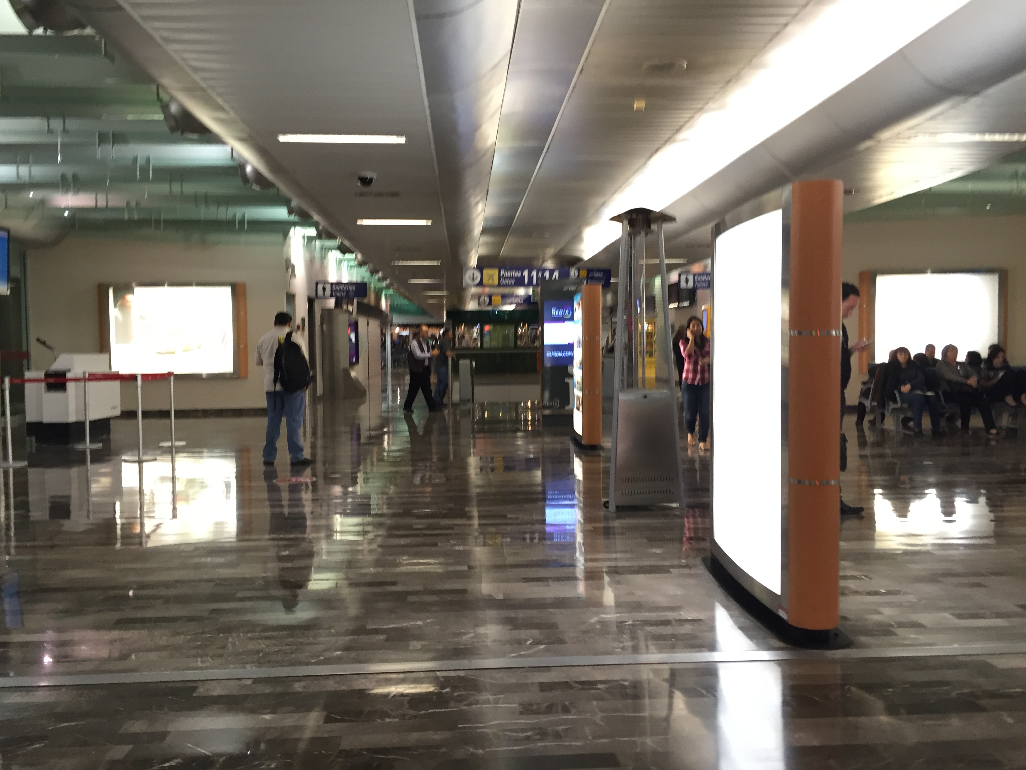 Terminal Satélite del Aeropuerto Internacional de Monterrey.